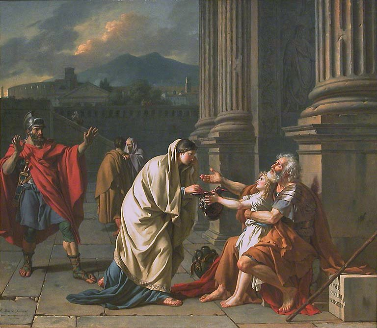 Belisaire demandant l'aumône musée du Louvre version réduite du tableau de Lille